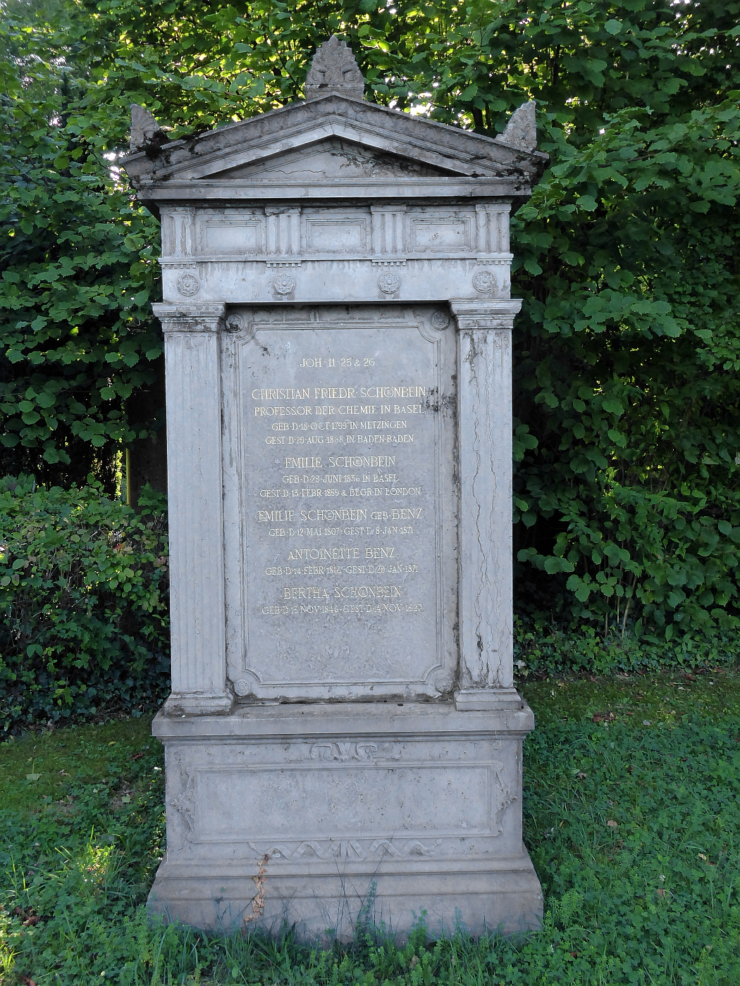 Christian Friedrich-Schönbein,1799-1868, Grab auf dem Friedhof Wolfgottesacker, Basel